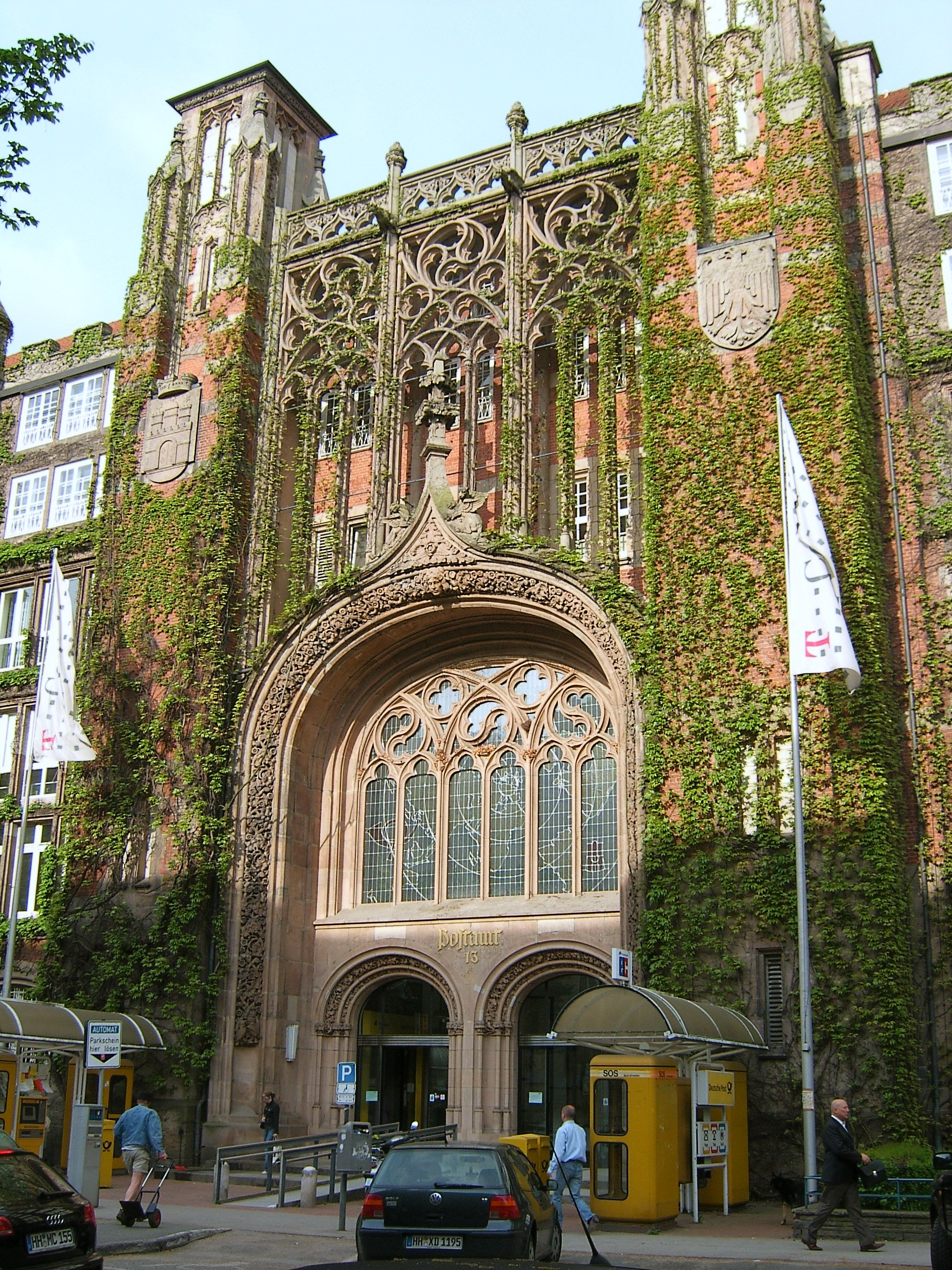 Das ehemalige Fernmeldeamt 1 in der Schlüterstraße 51-55 in Rotherbaum beherbergte auch das Postamt HH13, dessen Eingang hier zu sehen ist. Das Gebäude wurde von 1907 bis 1907 durch den Geheimen Baurat Paul Schuppan und Postbaurat Willy Sucksdorf errichtet. In neogotischer Art gliedert Sandstein die Backsteinfassade. This is a photograph of an architectural monument.